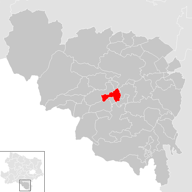 Bezirk Neunkirchen